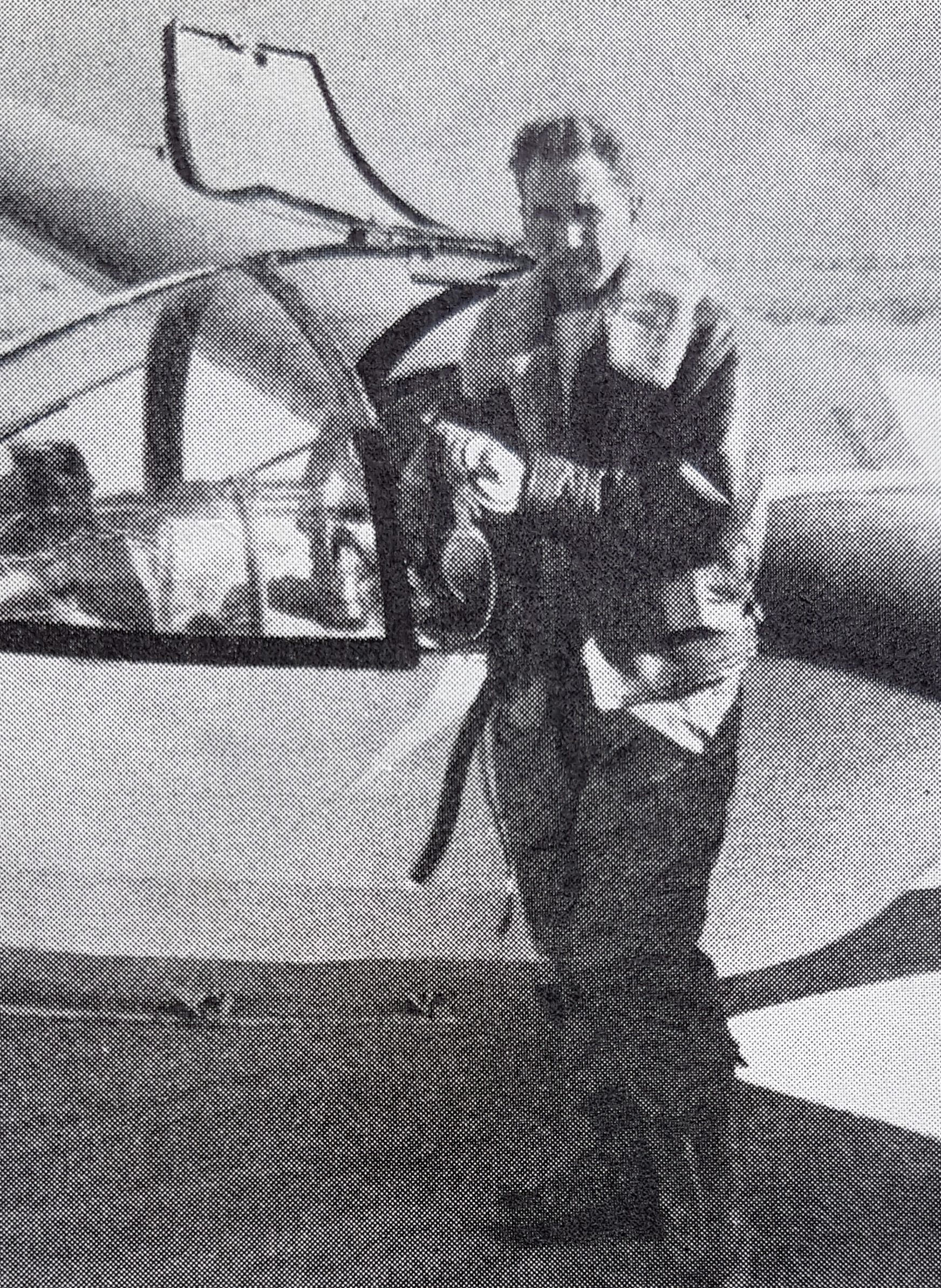 Karl Erik Övgård